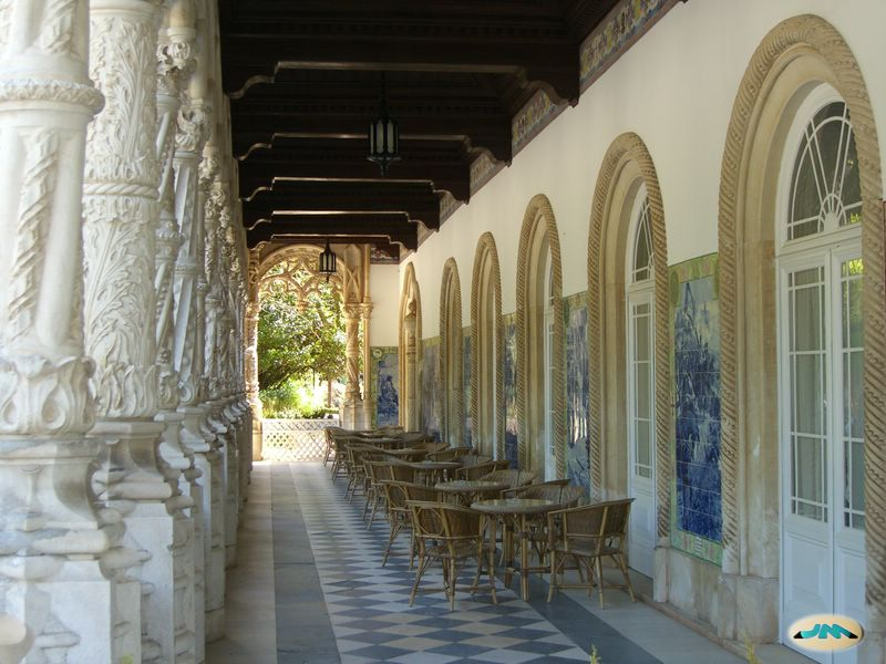 Busaço68